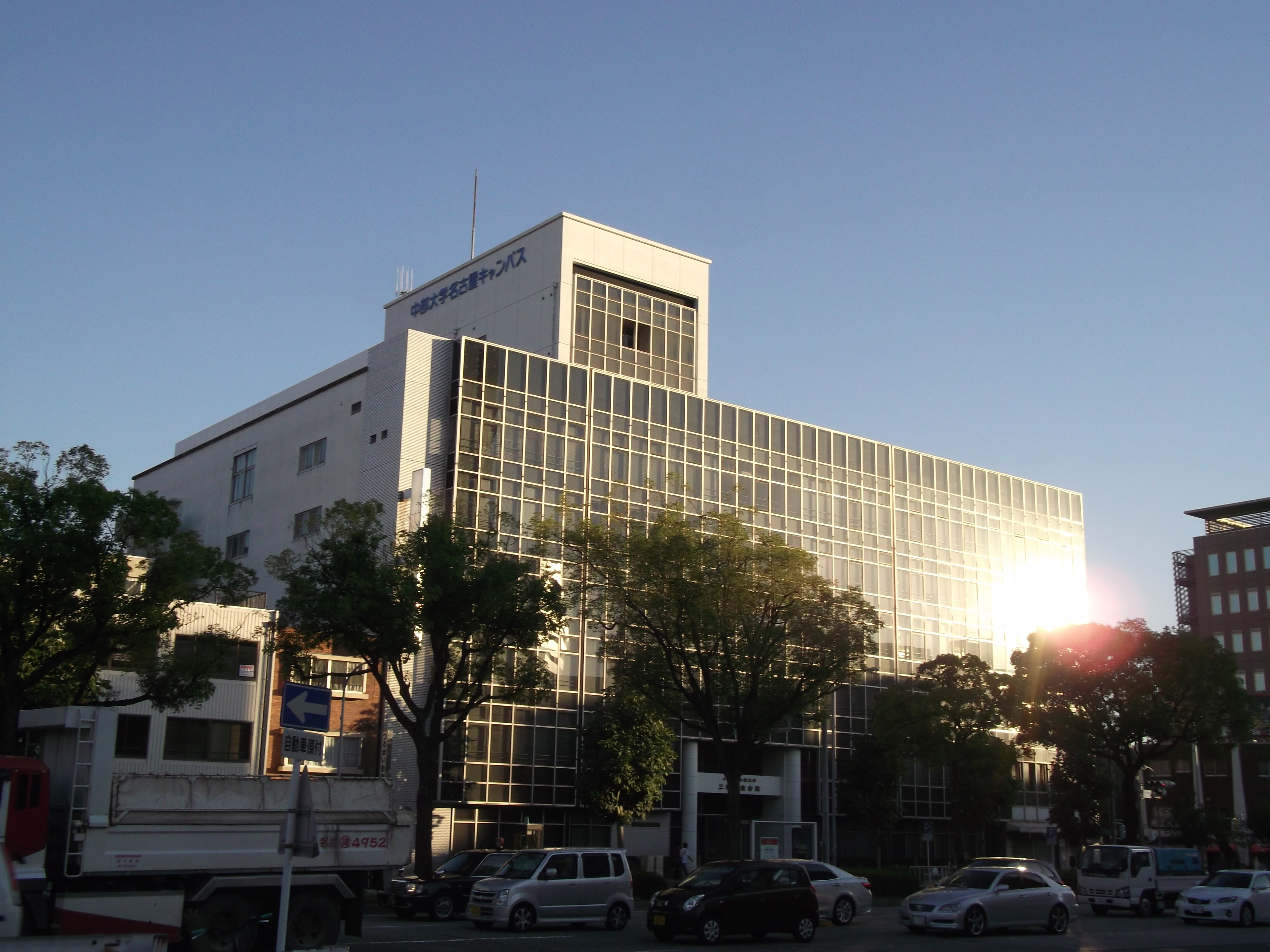 名古屋市中区千代田の中部大学名古屋キャンパスを北側より撮影